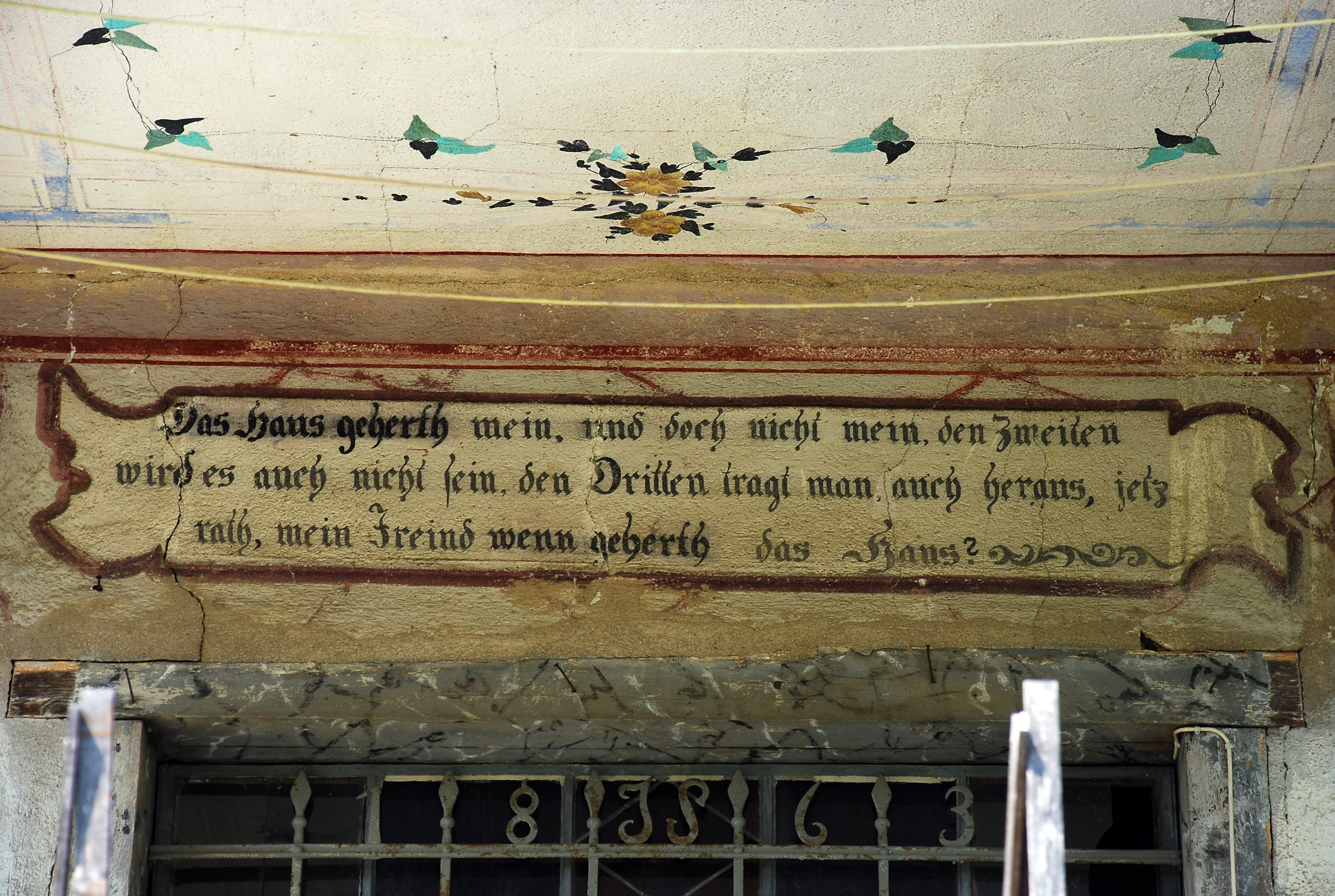 Frauental an der Laßnitz, Ortsteil Schamberg, Steiermark, Österreich: denkmalgeschütztes Haus (Rotschädlhaus, Erzherzog Johann Haus) Deckenbemalung im Hauseingang